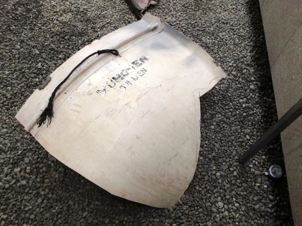 Fragment des Rettungsbootes der München im Deutschen Schiffahrtsmuseum